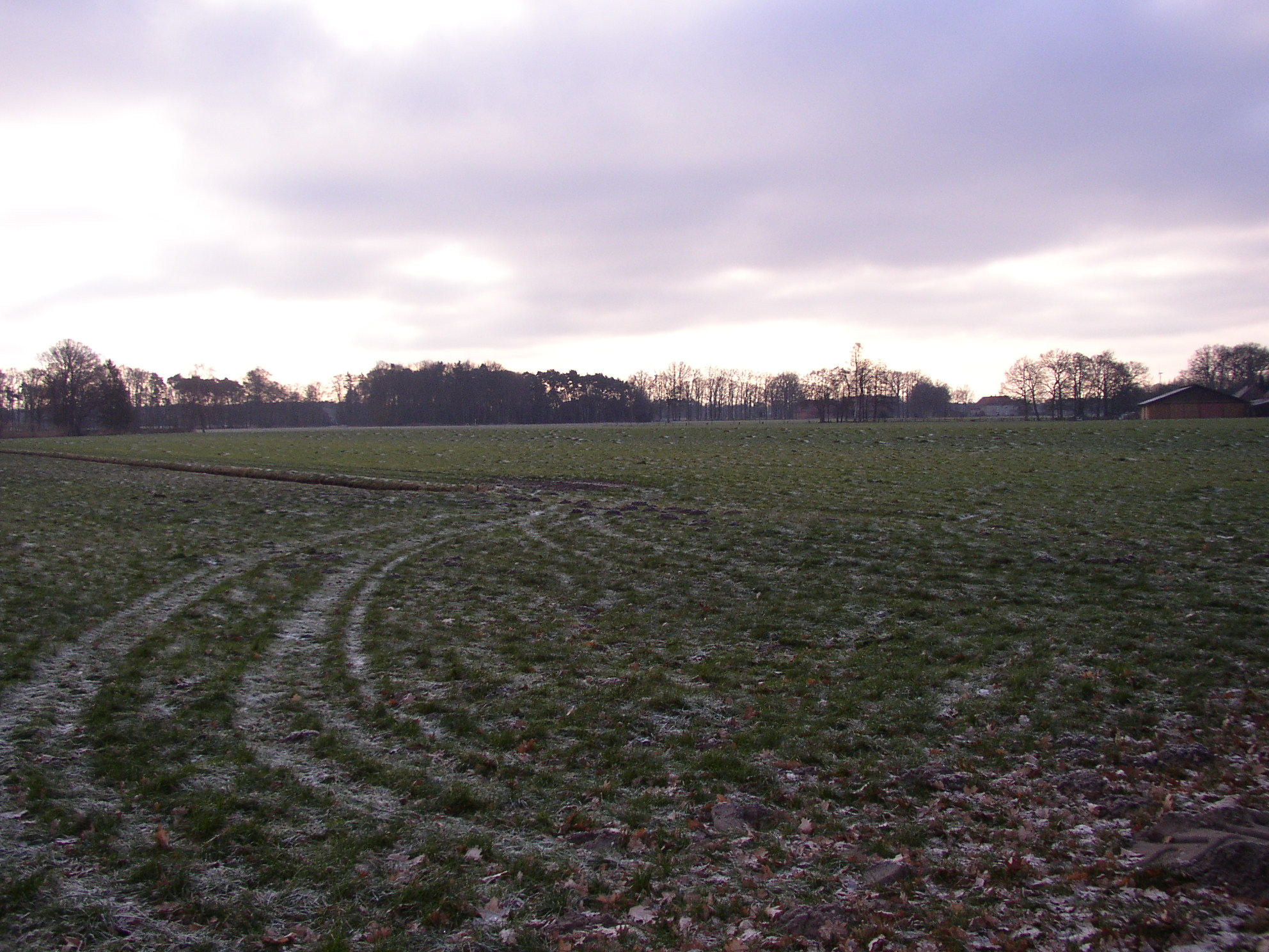 Halle (Westf) - NSG Feuchtwiesen Hörste